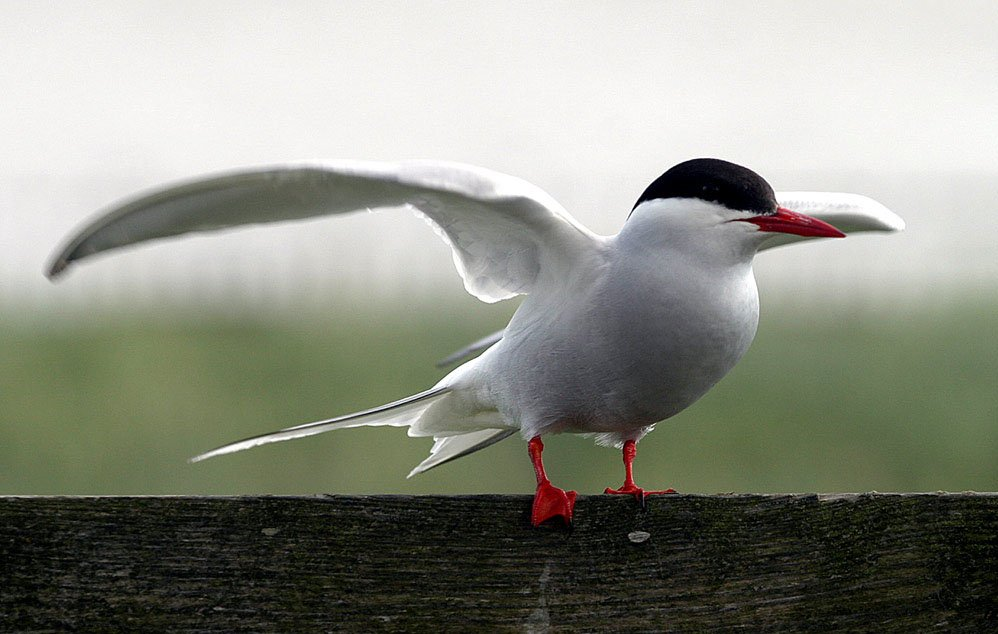 Küstenseeschwalbe (Sterna paradisaea) auf Norderoog